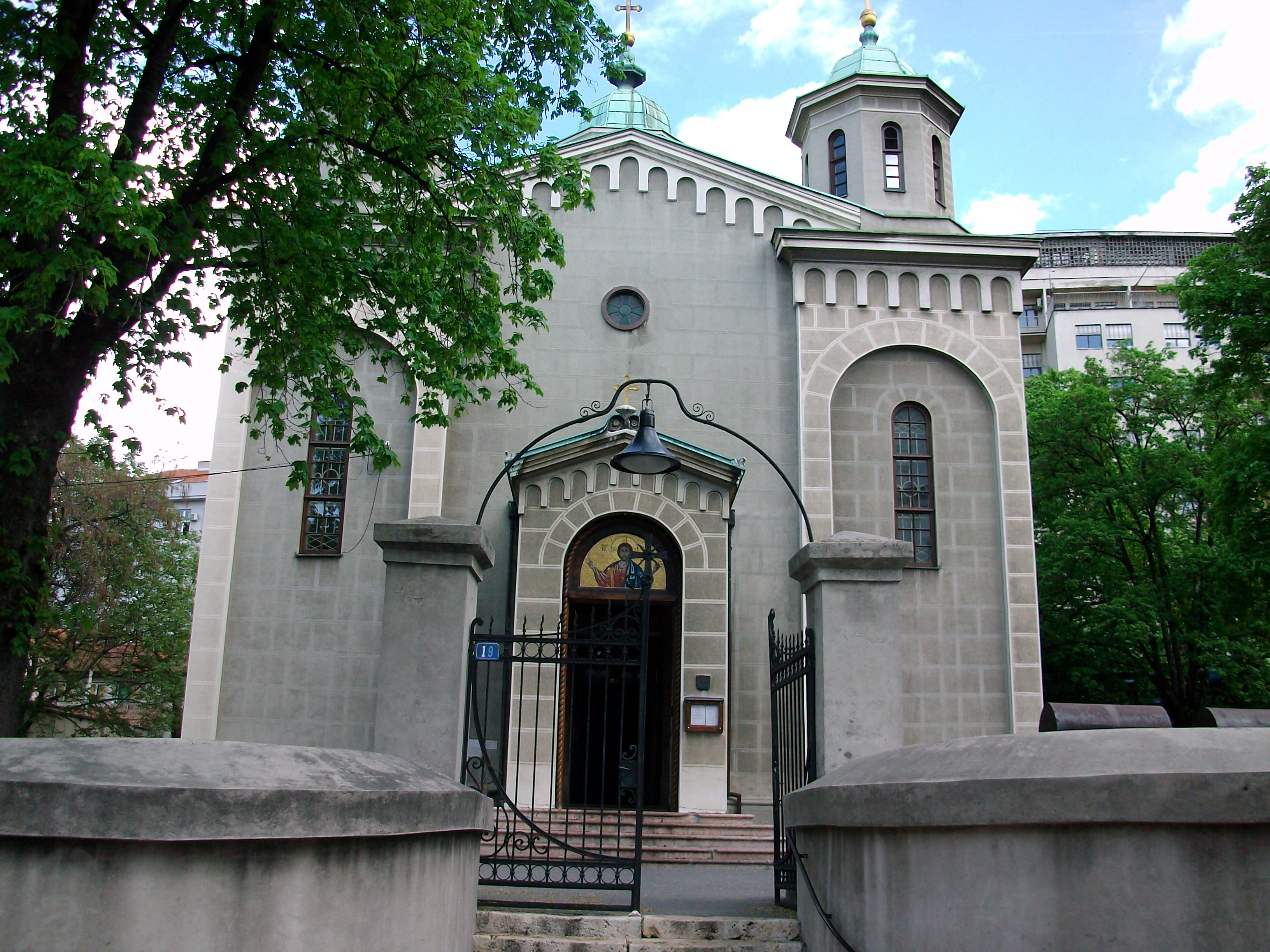 Вазнесењска црква у Београду